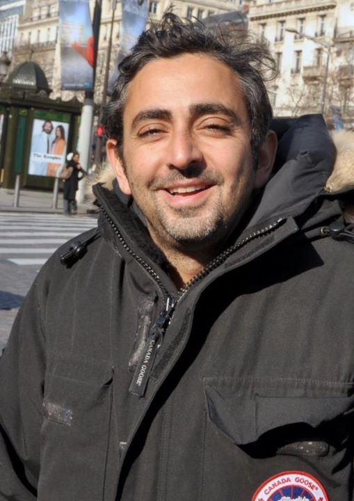 Eric Toledano au déjeuner des nommés des César du cinéma